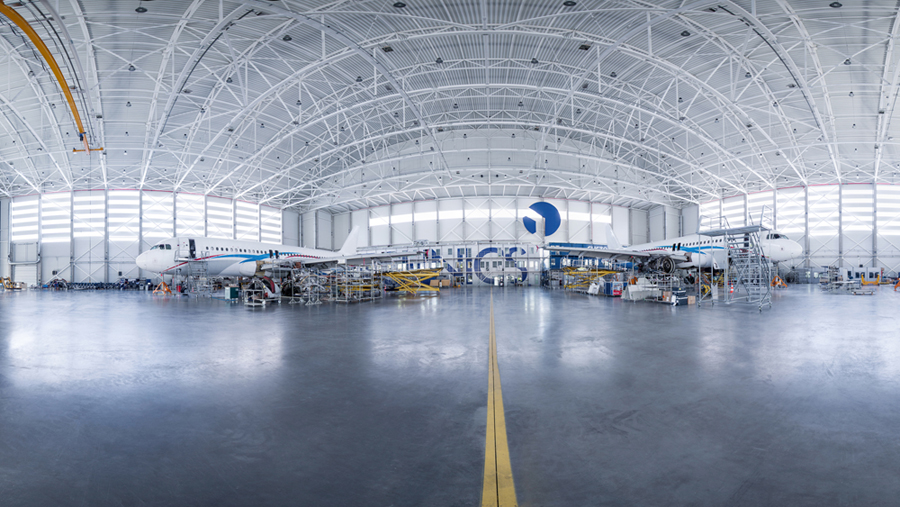 FL Technics angaro vidus Kauno oro uoste